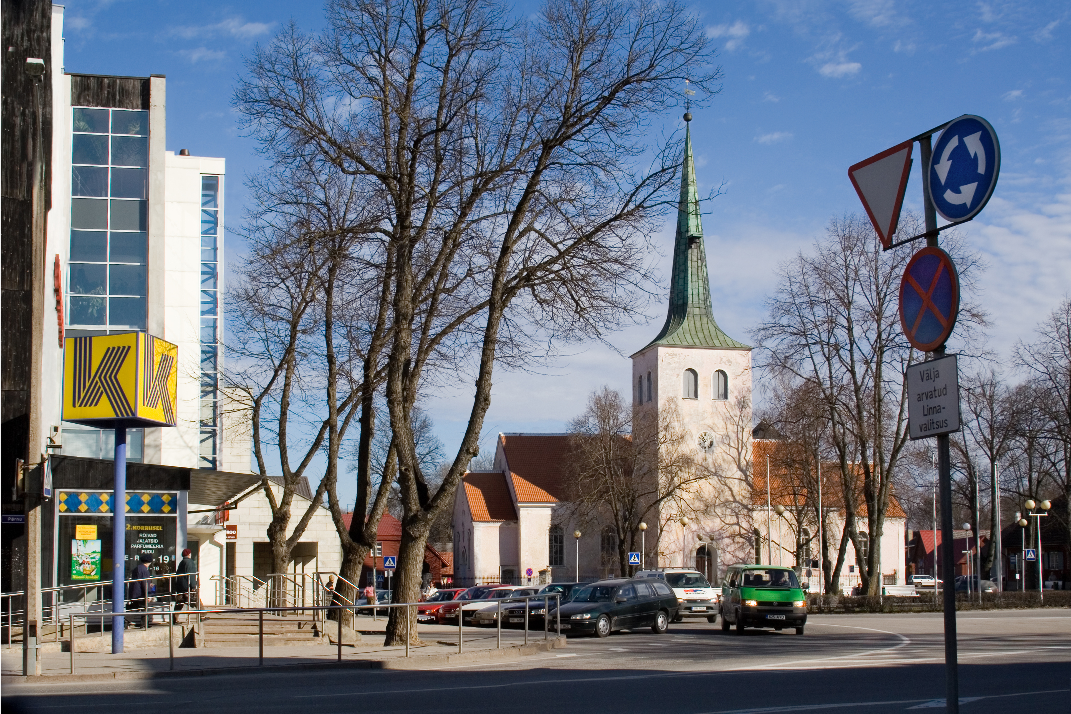 Paide Püha Risti kirik